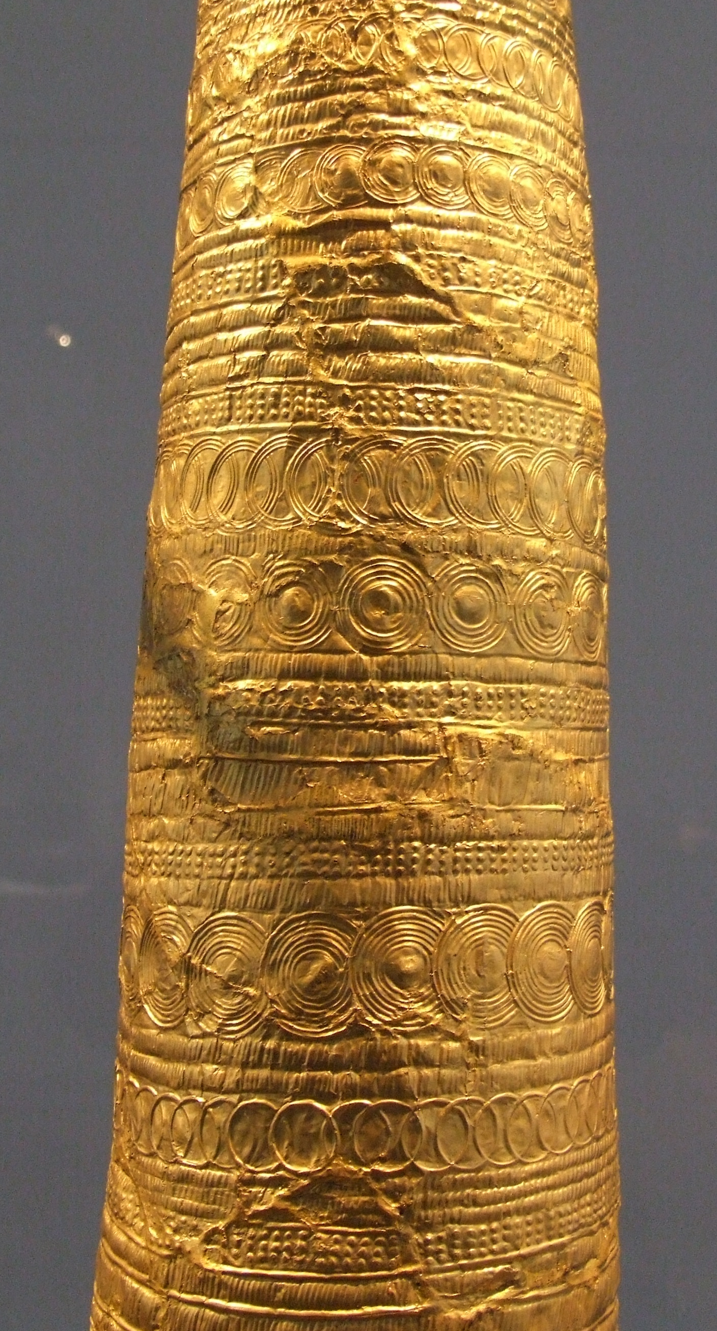 Goldblechkegel von Ezelsdorf-Buch - 2 - oberer Teil des Schaftes, Germanisches Nationalmuseum ( Nürnberg / Deutschland ), Urnenfelder Kultur, 11.-9.Jhdt. v.Chr. - Detail.